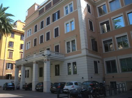 SedeUniversità degli Studi Guglielmo Marconi, Via Paolo Emilio